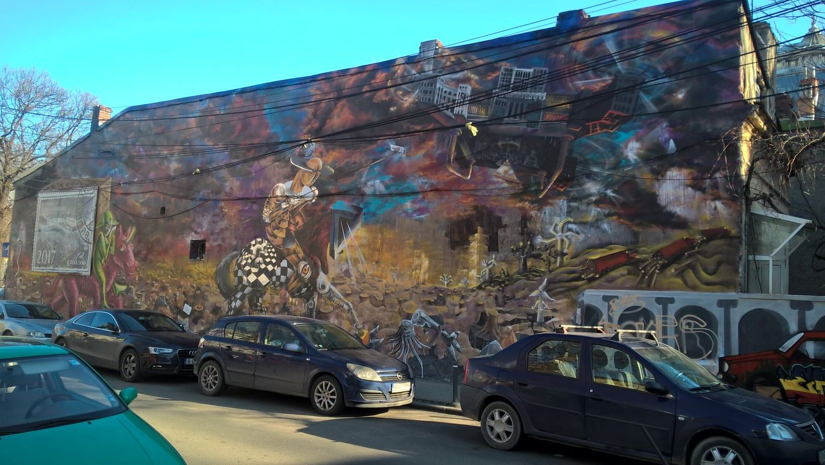 Strada Arthur Verona din Bucuresti, Romania - Calcan de casa. Calcanul casei aflat la intersecţia străzii Arthur Verona cu Dionisie Lupu din Bucureşti a devenit din anul 2005 un punct de atracţie al artiştilor urbani care au realizat picturi murale care au intrat în memoria colectivă a bucureştenilor. Ca urmare, proiectul Street Delivery demarat de către Ordinul Arhitecţilor din România şi Librăria Cărtureşti în anul 2006 a avut ca scop o încercare pentru recuperarea spaţiului public pentru pietoni dintre Grădina Icoanei şi Grădina Cişmigiu. Calcanul de pe strada Verona a devenit de-a lungul timpului unul dintre simbolurile urbane din capitala României, picturile murale derulându-se una după alta, întreaga zonă fiind declarată ca o zonă artistică protejată. În iunie 2016, noul proprietar al imobilului a depus la primăria capitalei documentaţia necesară pentru demolarea imobilului şi intenţia de construire a unei clădiri de birouri în cursul aceluiaşi an.